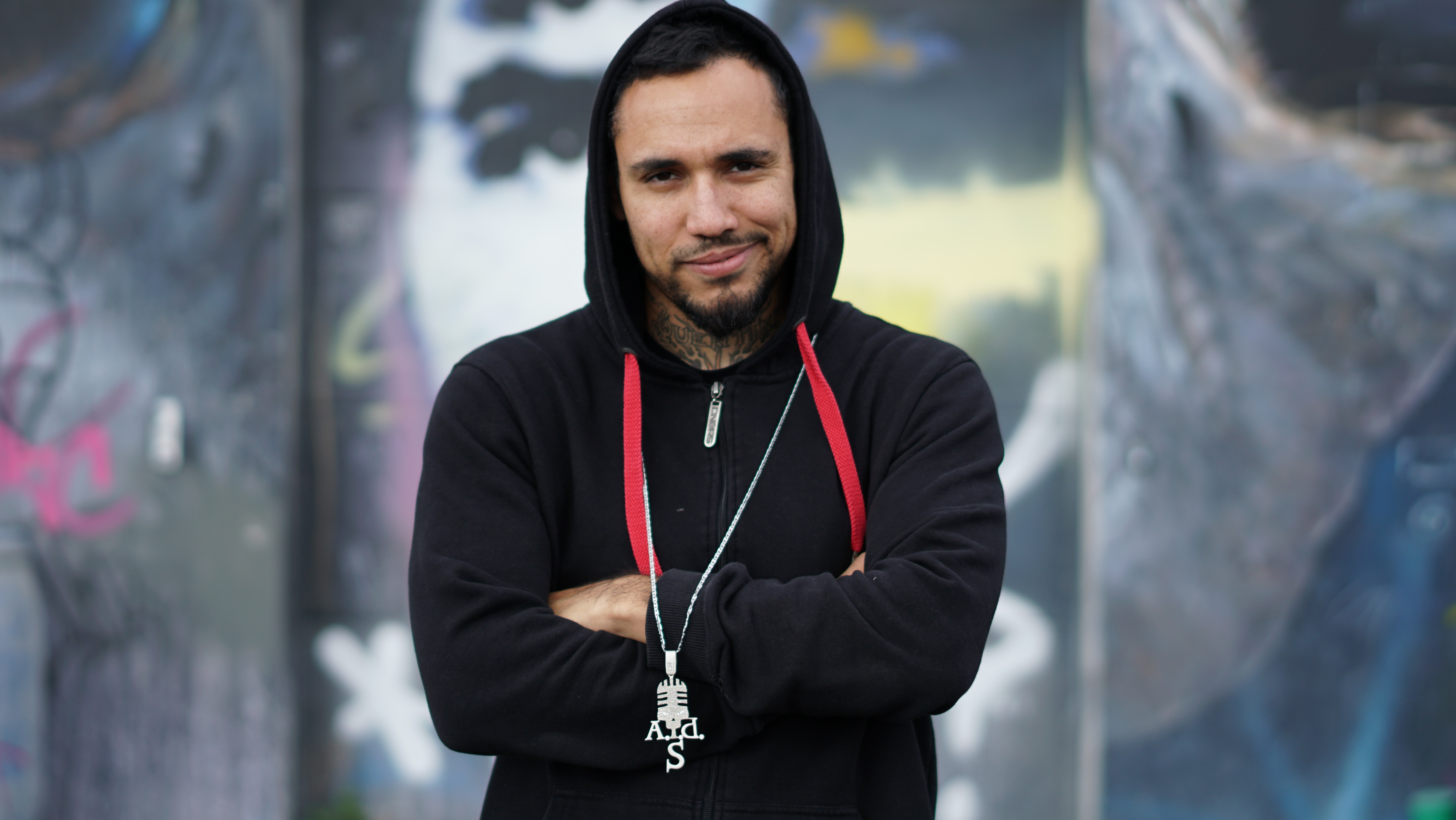 B-Tight - offizielles Pressefoto